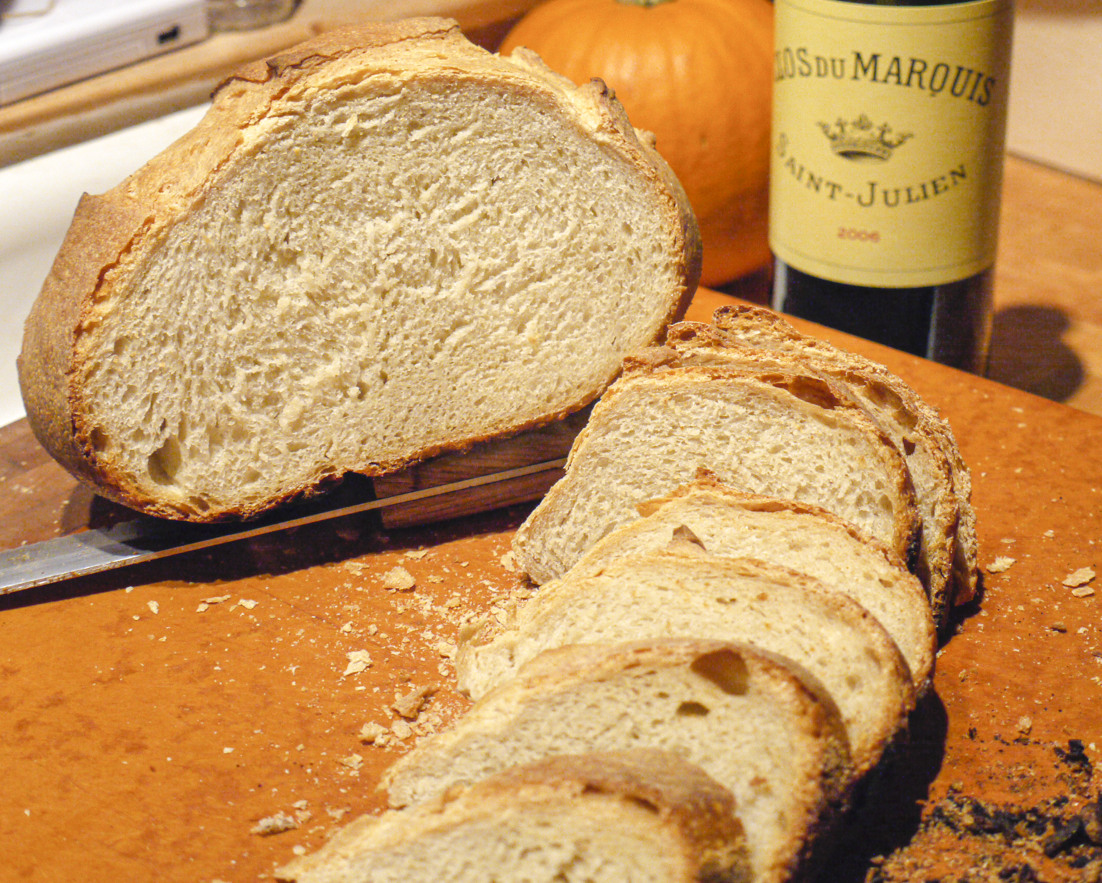 Pain de Campagne - Sliced